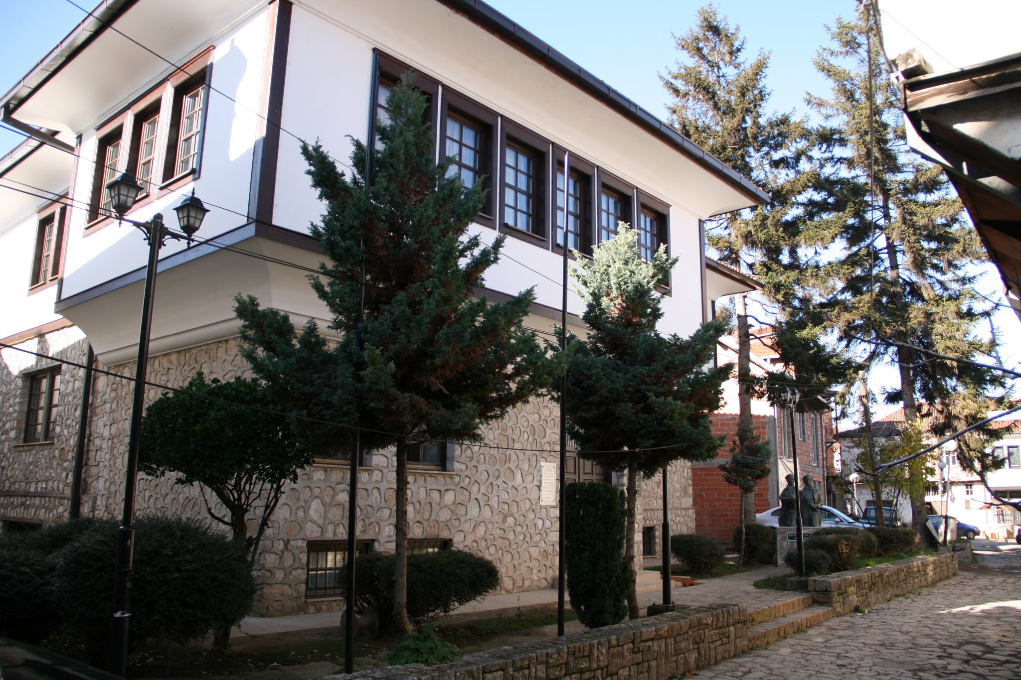 Spomen Dom na Braka Miladinovci -- Struga